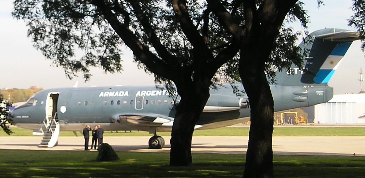 Fokker F28 de la Marina Argentina en el Aeropuerto Militar de Aeroparque